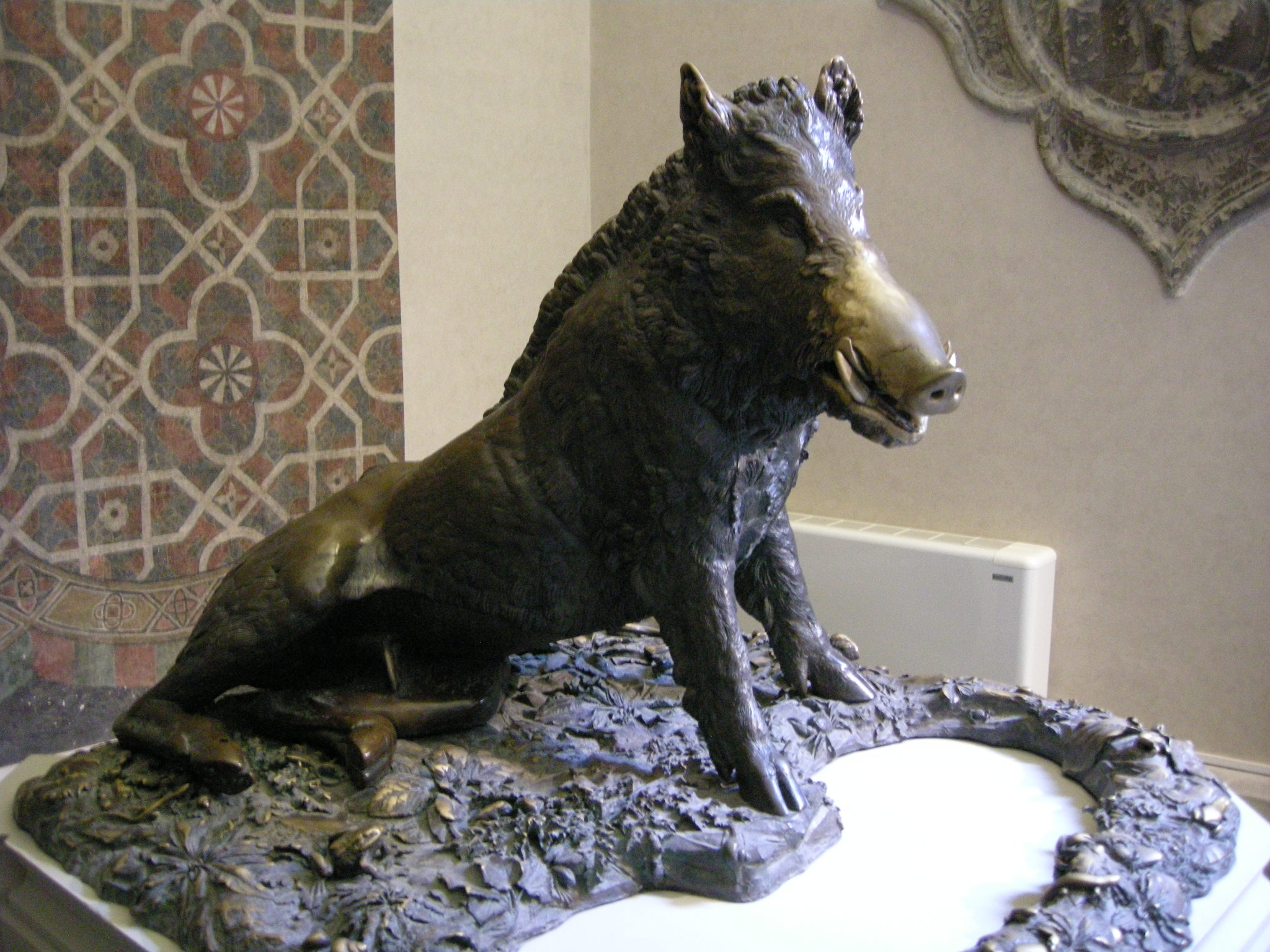 Porcellino di pietro tacca, originale